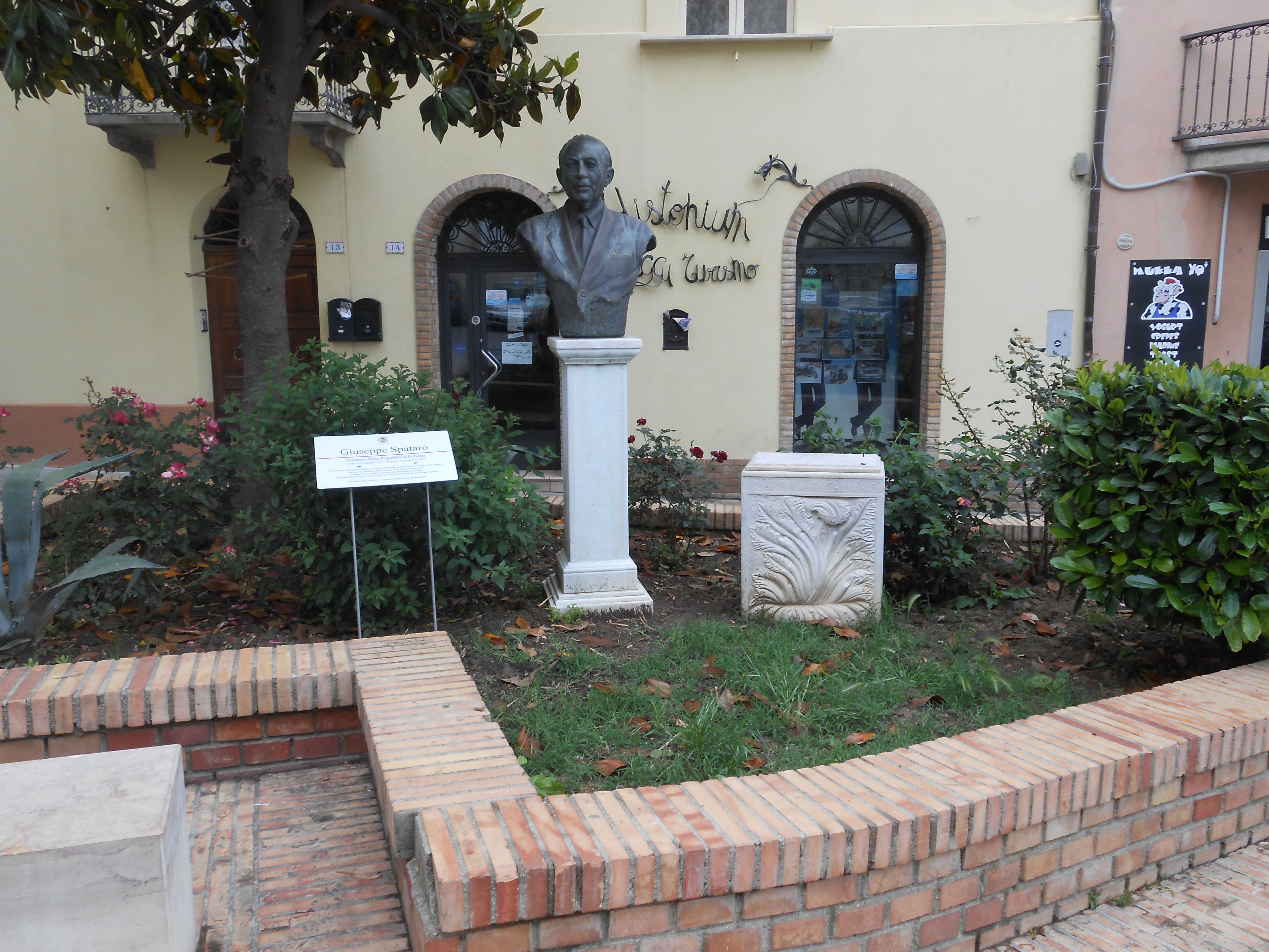 monumento a Giuseppe Spataro, Vasto